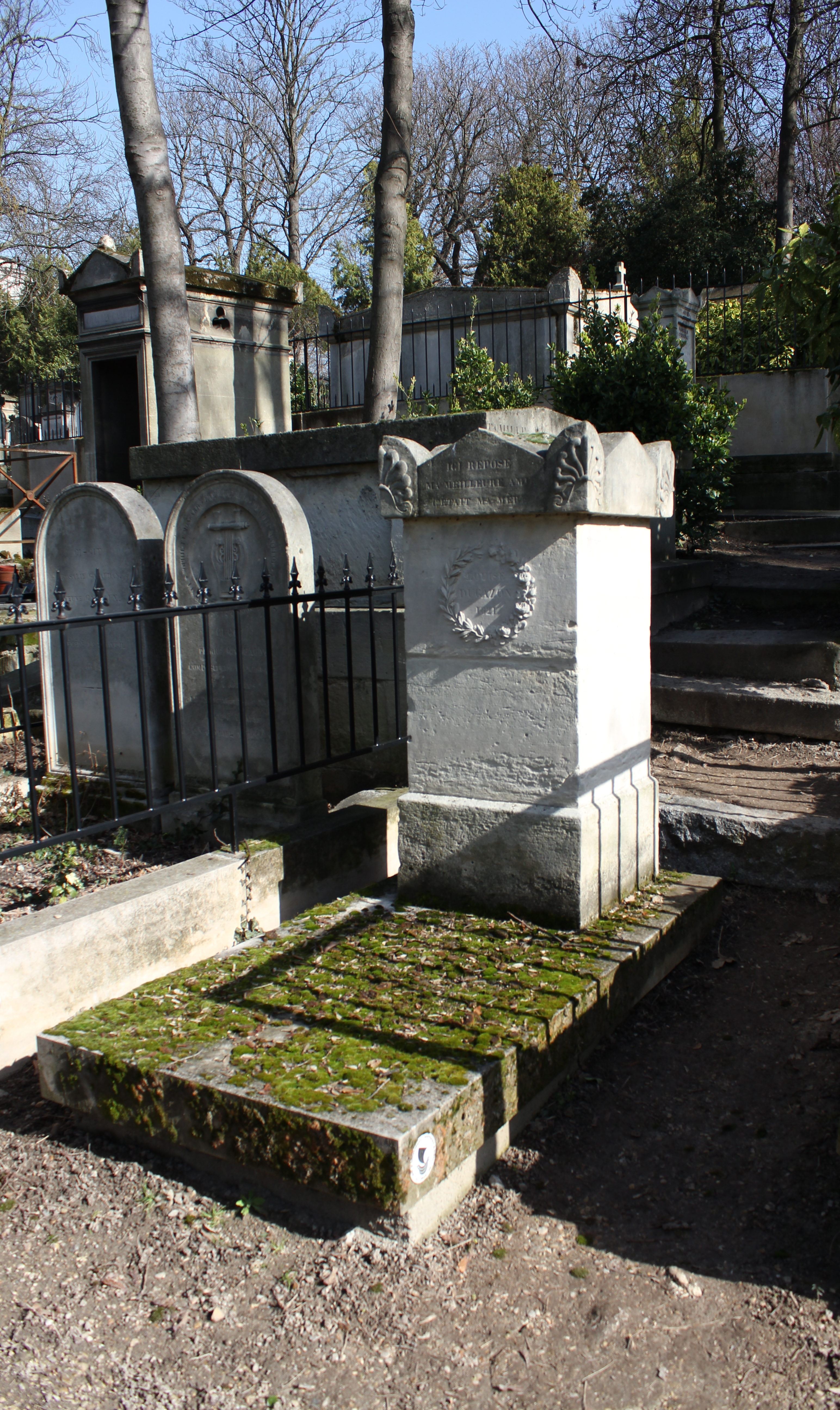 Stèle quadrangulaire ornée sur sa face antérieure d'une couronne sculptée comprenant une branche de laurier et une branche de rosier. Sépulture de la famille Dugazon comprenant : Jean-Henri Gourgaud, dit Dugazon (1746-1809), acteur Louise-Rosalie Lefebvre, dite Madame Dugazon, (1755-1821), comédienne, chanteuse et danseuse et épouse de Dugazon Gustave Dugazon (1782-1829), compositeur et fils de Dugazon et Madame Dugazon vue générale